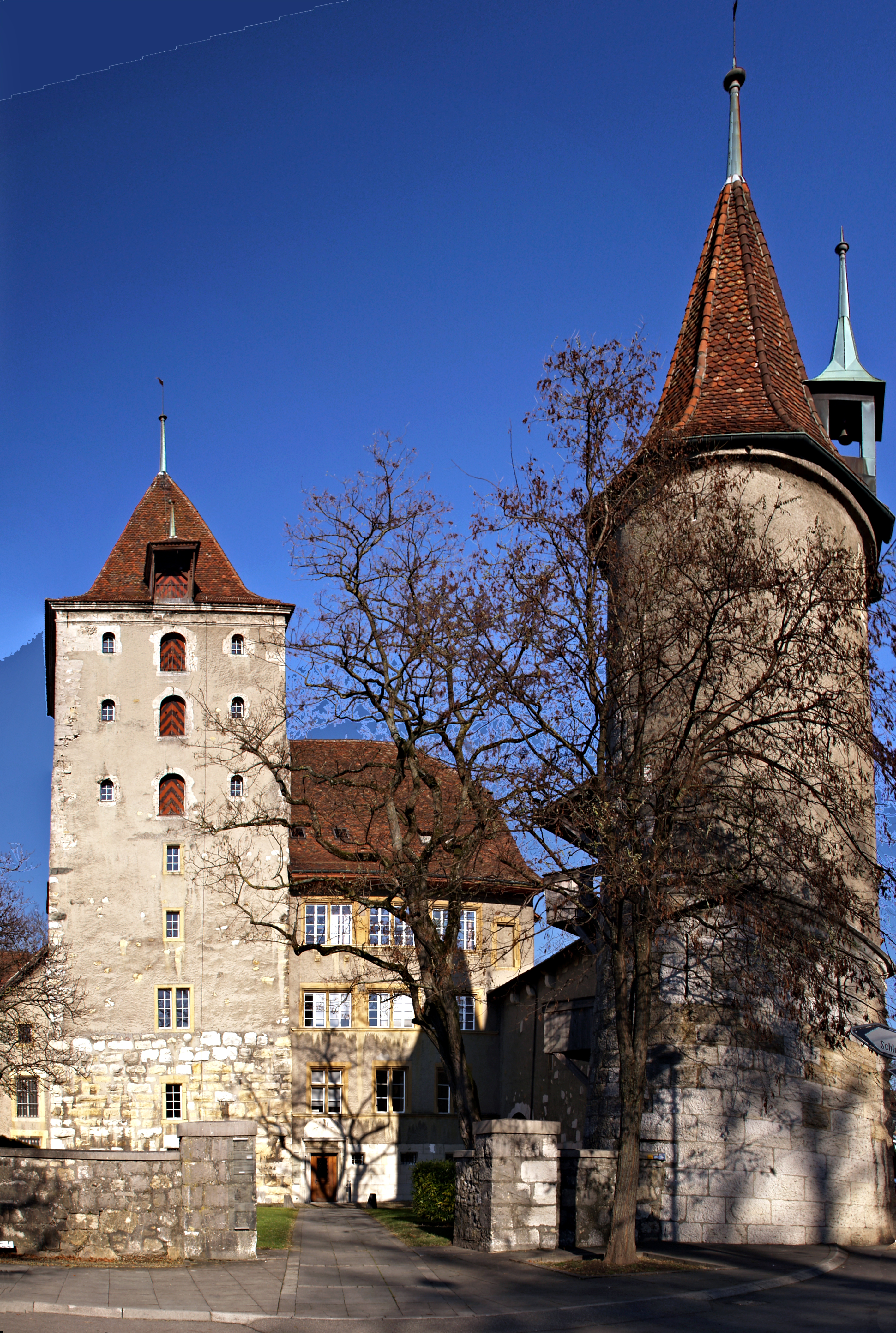 Nidau, Berne (Suisse) - Entrée du château